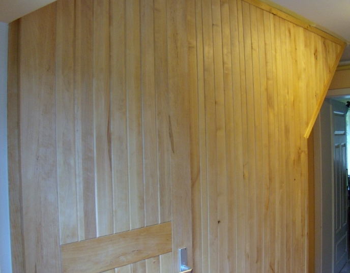 Zdjęcie-S. Mrówczyński